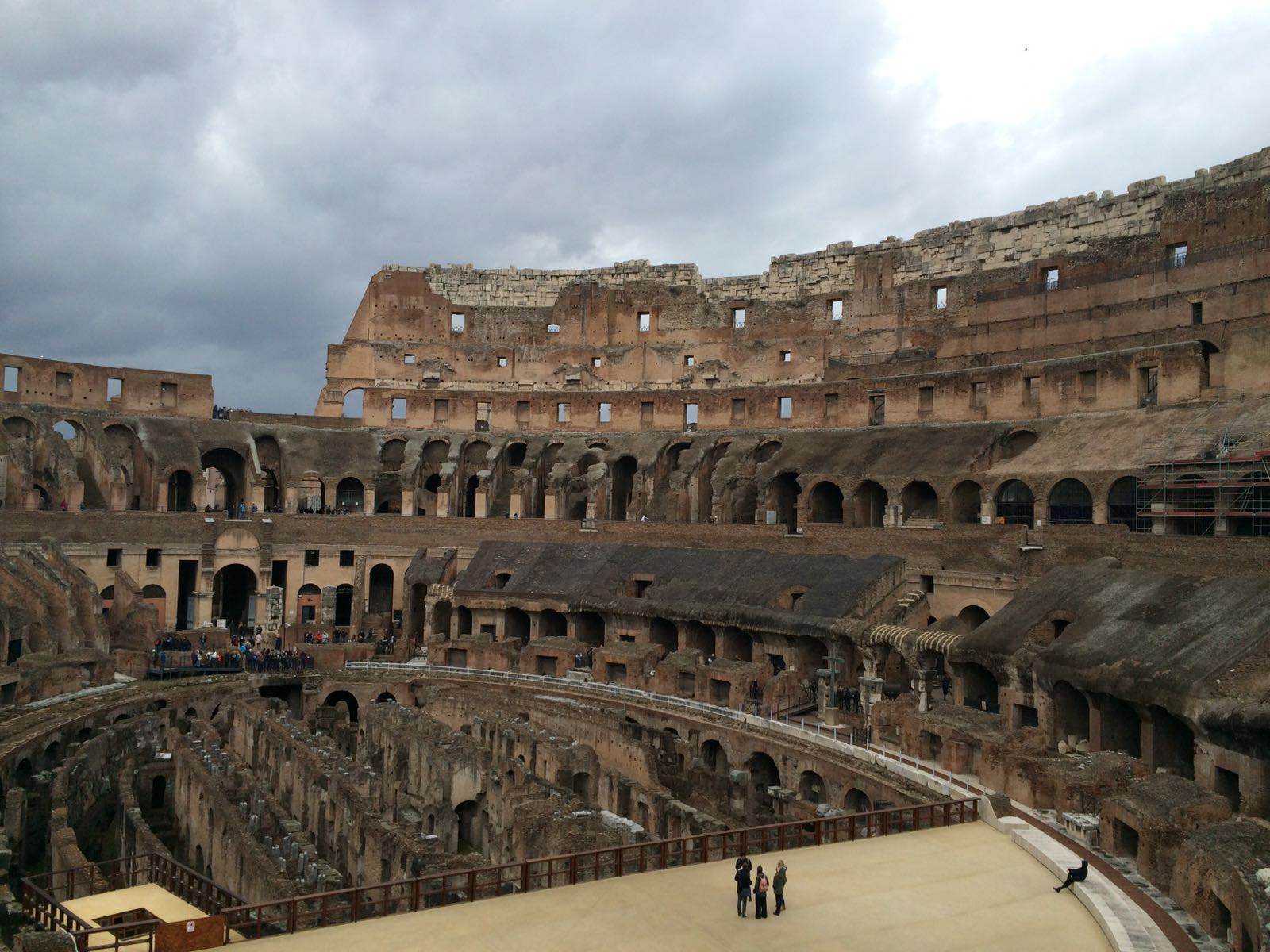 El Coliseo (en latín: Amphitheatrum Flavium Romae) es un anfiteatro de la época del Imperio romano, construido en el siglo I d. C. y ubicado en el centro de la ciudad de Roma. Originalmente era denominado Anfiteatro Flavio (Amphitheatrum Flavium), en honor a la Dinastía Flavia de emperadores que lo construyó, y pasó a llamarse Colosseum por una gran estatua que había cerca, el Coloso de Nerón, que no ha llegado hasta nosotros. Por su conservación e historia, el Coliseo es uno de los monumentos más famosos de la antigüedad clásica. Fue declarado Patrimonio de la Humanidad en 1980 por la Unesco y una de Las Nuevas Siete Maravillas del Mundo Moderno el 7 de julio de 2007.